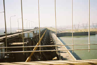 Fotografía del río Parana al paso de Ayolas.